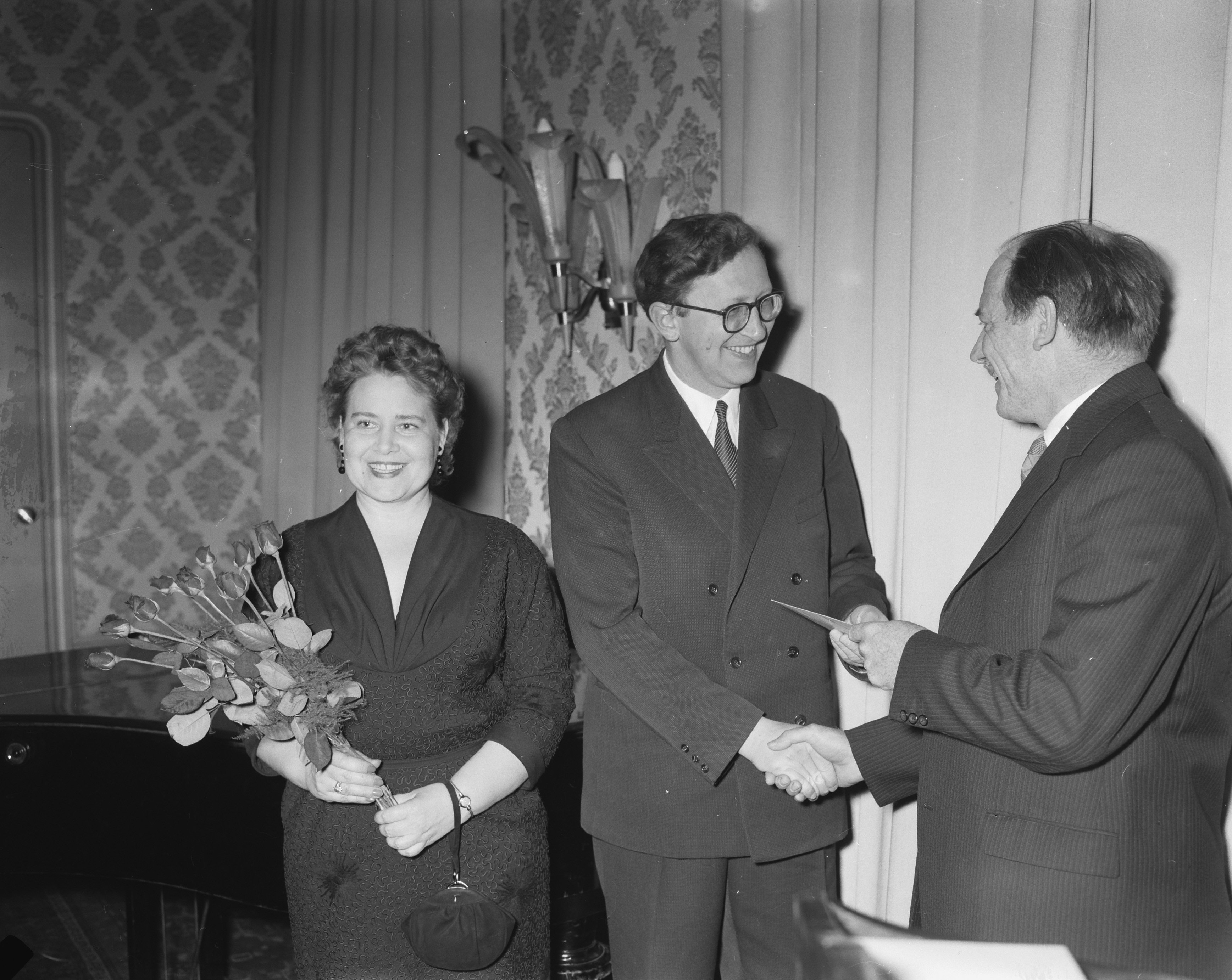 Collectie / Archief : Fotocollectie Anefo Reportage / Serie : [ onbekend ] Beschrijving : Prijsuitreiking Schaken. Kandidatentoernooi Datum : 1 mei 1956 Trefwoorden : Prijsuitreikingen, SCHAKEN Fotograaf : Noske, J.D. / Anefo Auteursrechthebbende : Nationaal Archief Materiaalsoort : Negatief (zwart/wit) Nummer archiefinventaris : bekijk toegang 2.24.01.04 Bestanddeelnummer : 907-7320